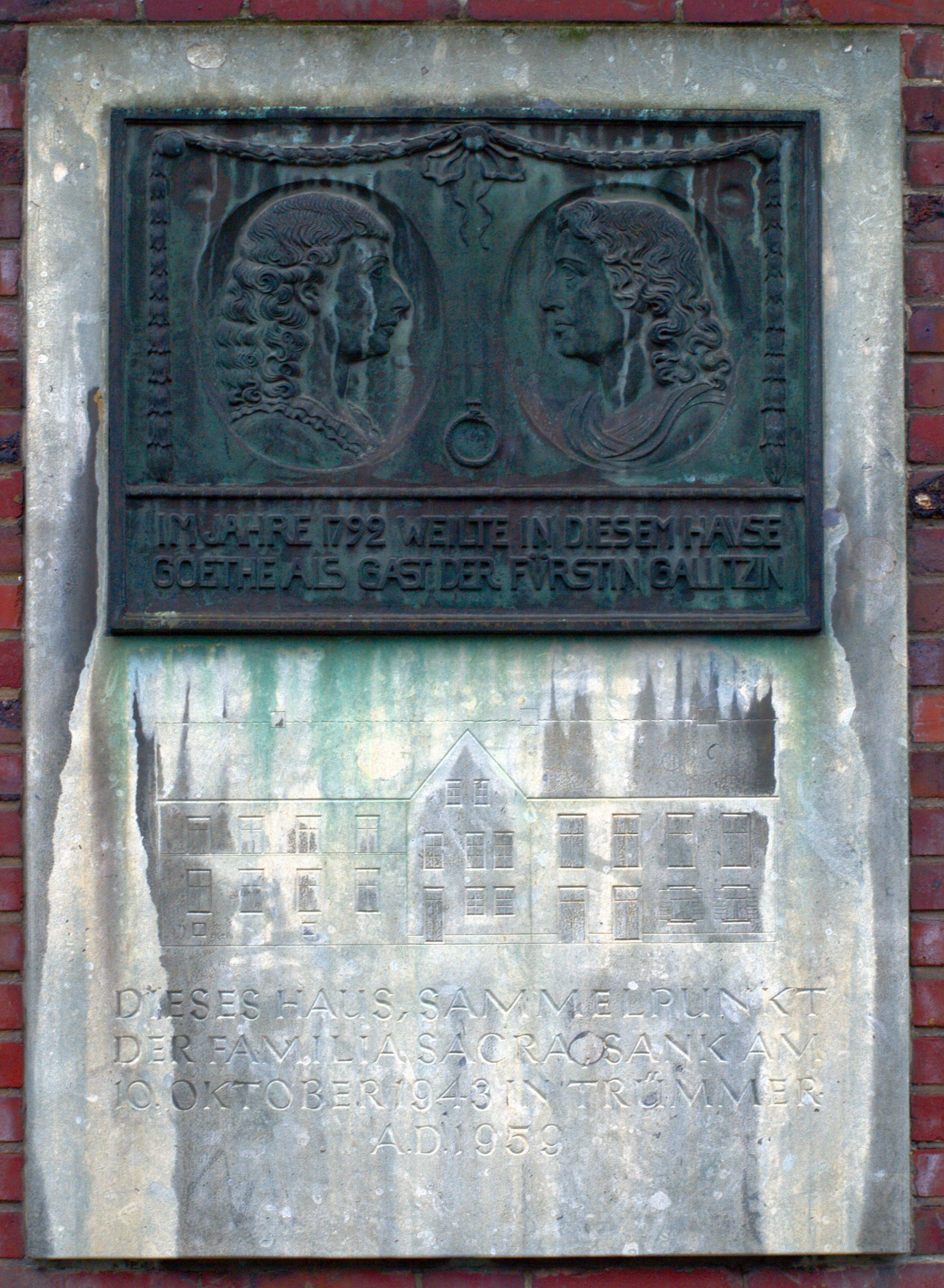 Aloys Röhr - Bronzene Gedenkplakette zum Treffen Goethes mit der Fürstin Gallizin am Annette-von-Droste-Hülshoff-Gymnasium in Münster